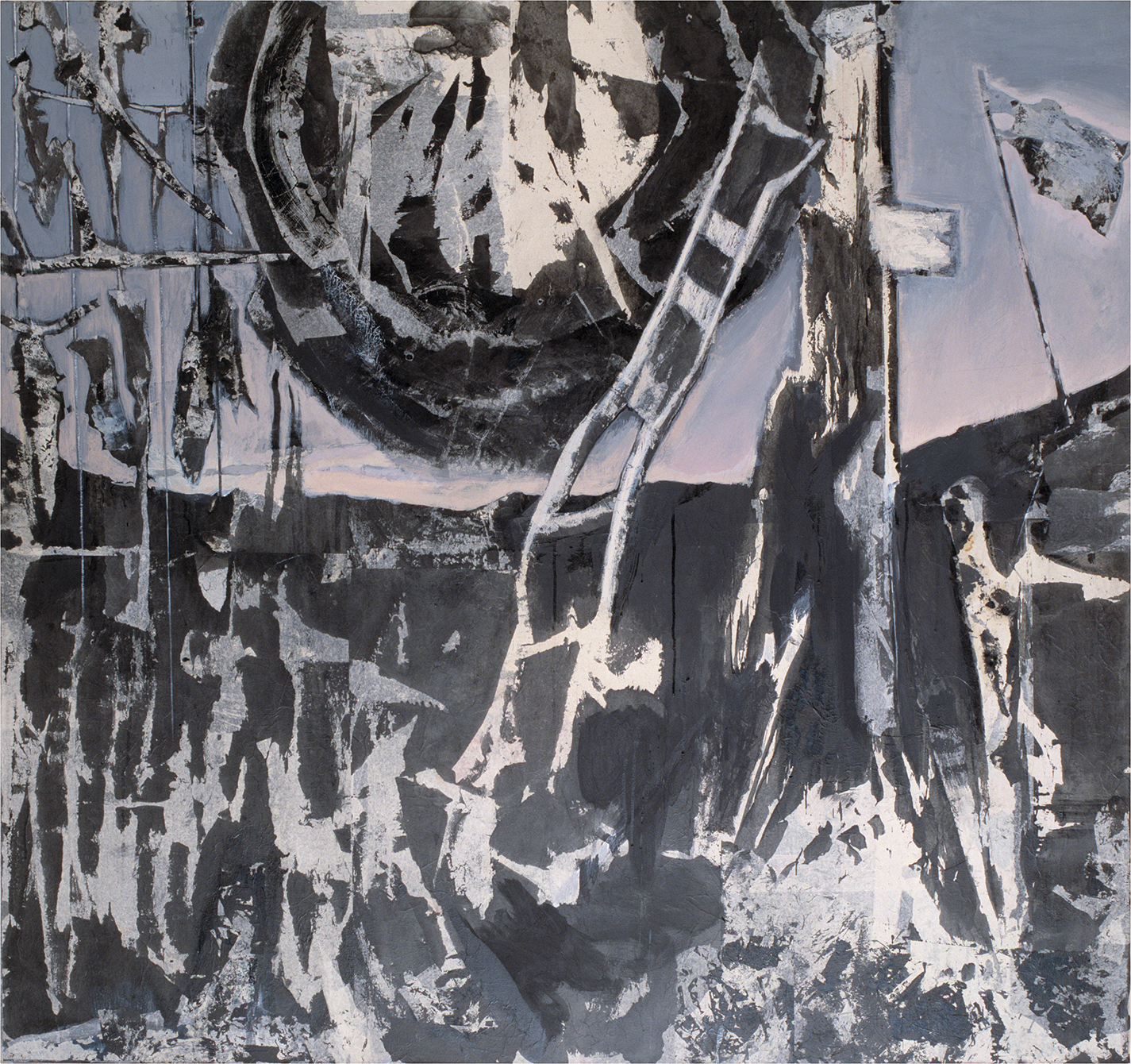 Peinture et Collage, 2000, 150x150 cm